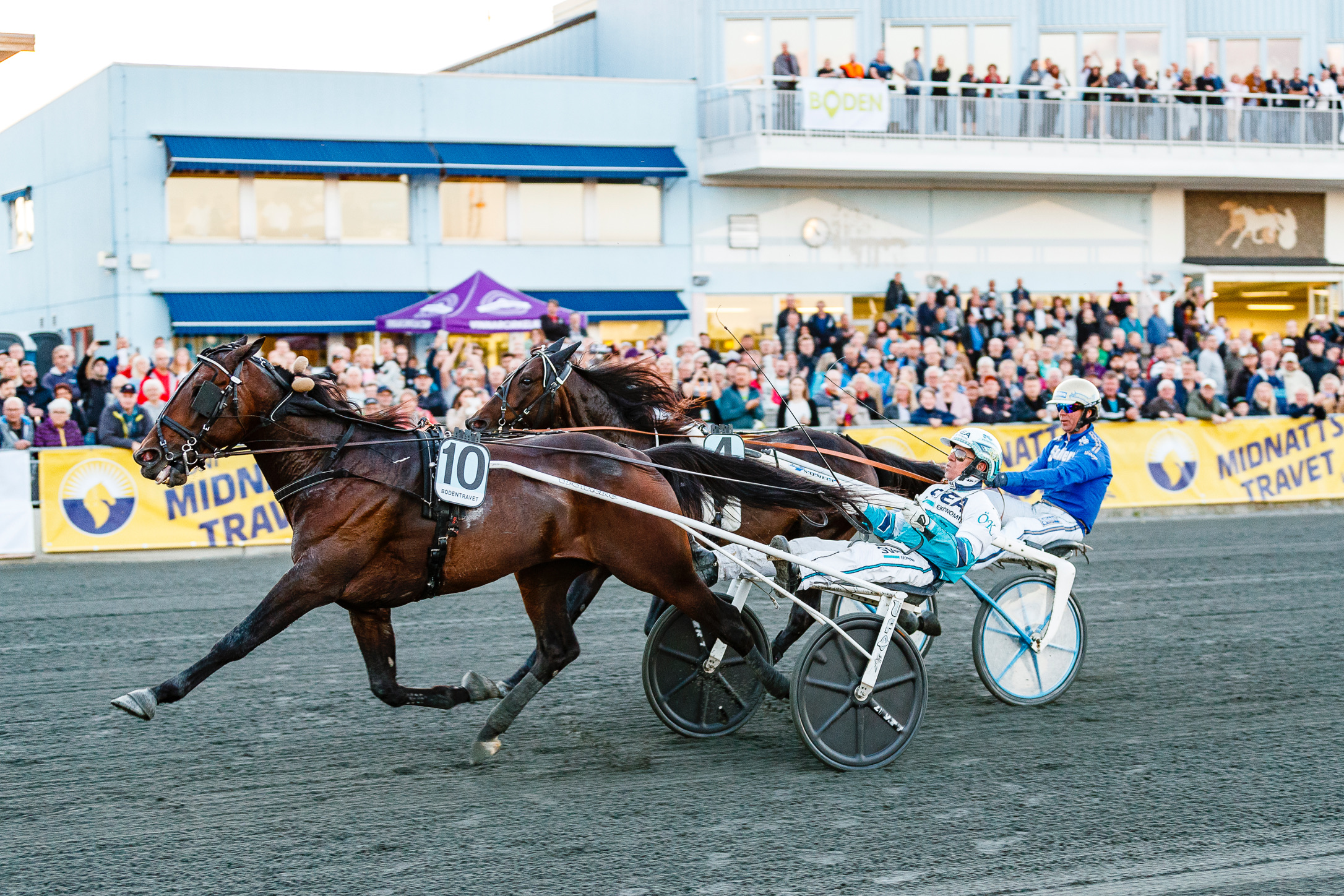 Foto: MATS ENGFORS / FOTOGRAPHIC Örjan Kihlström och Propulsion vinner Norrbottens Stora Pris